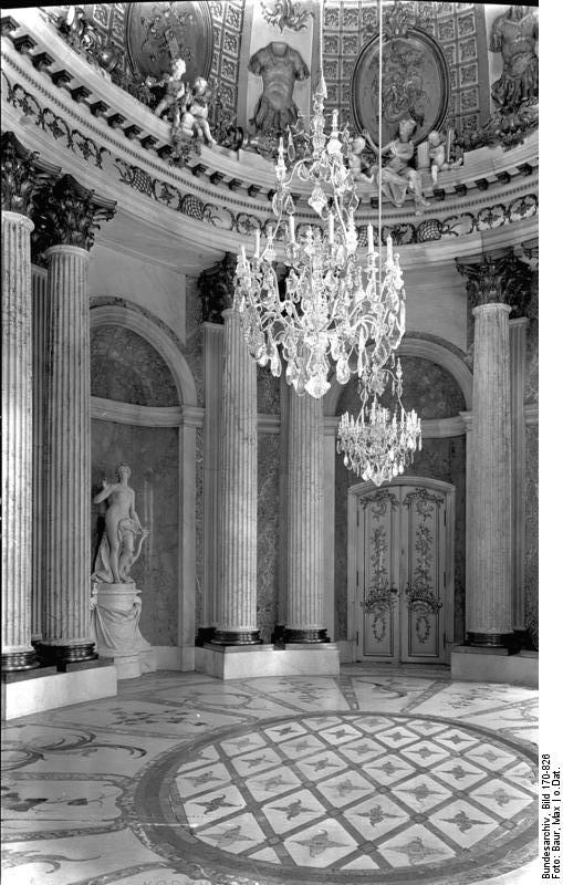 Potsdam.- Sanssouci, Marmorsaal